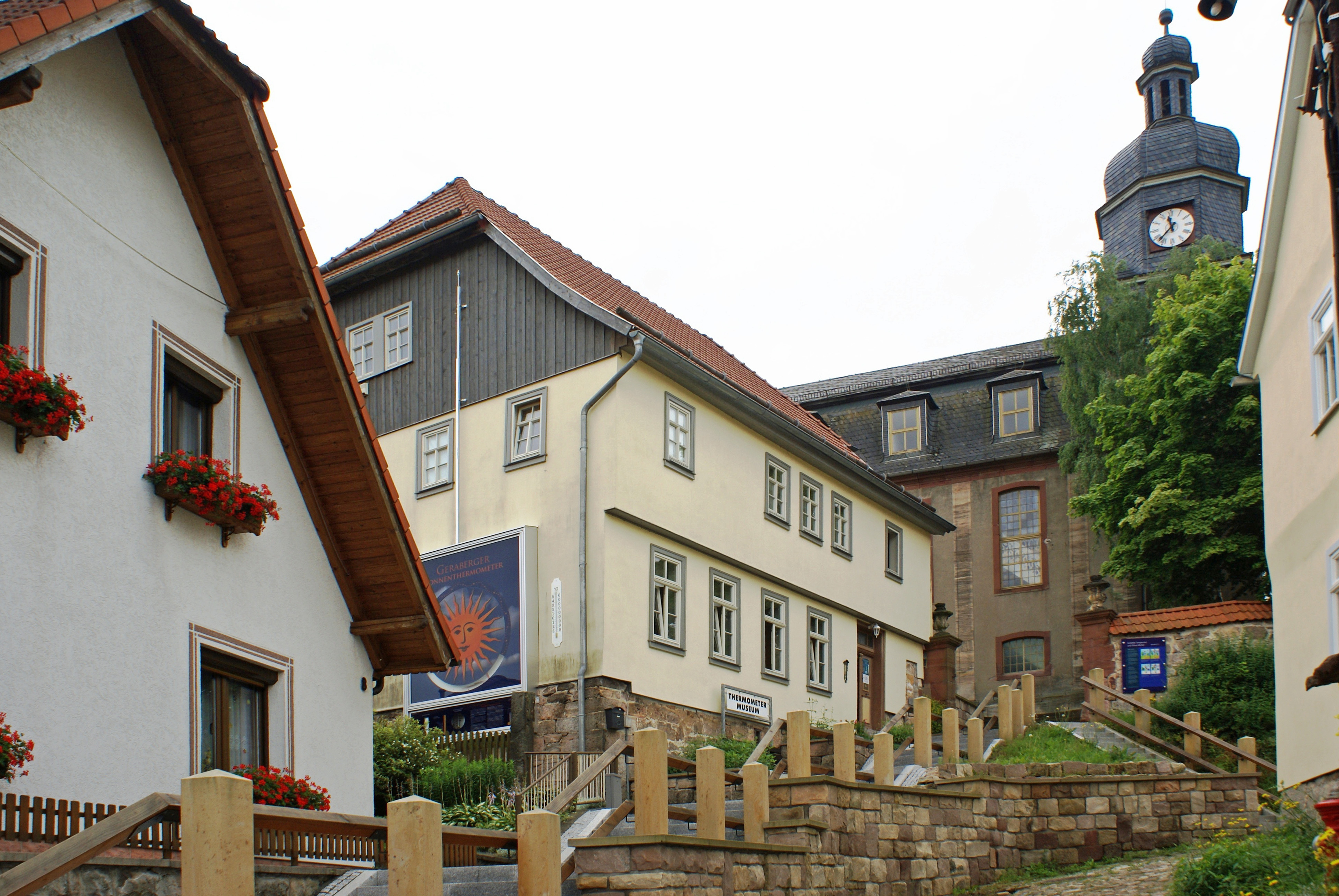 Blick auf das Deutsches Thermometermuseum in Geraberg - Ilm-Kreis, Thüringen, Deutschland.